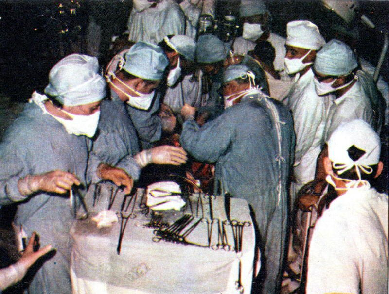 prvá transplantácia srdca v Česko-Slovensku, Bratislava 1968